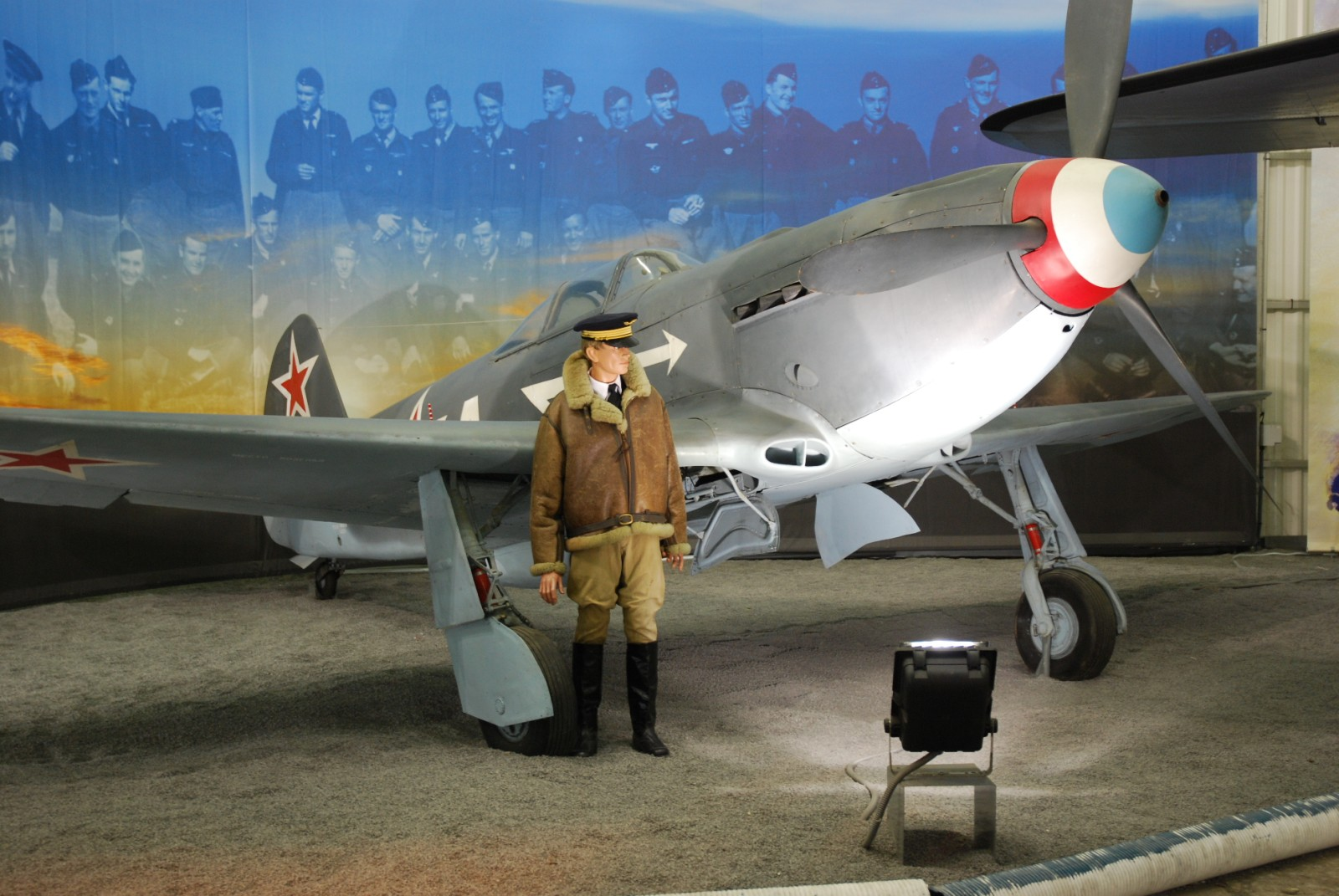 Yakovlev Yak 3, of Normandie-Niemen regiment, preserved at Musée de l'Air et de l'Espace